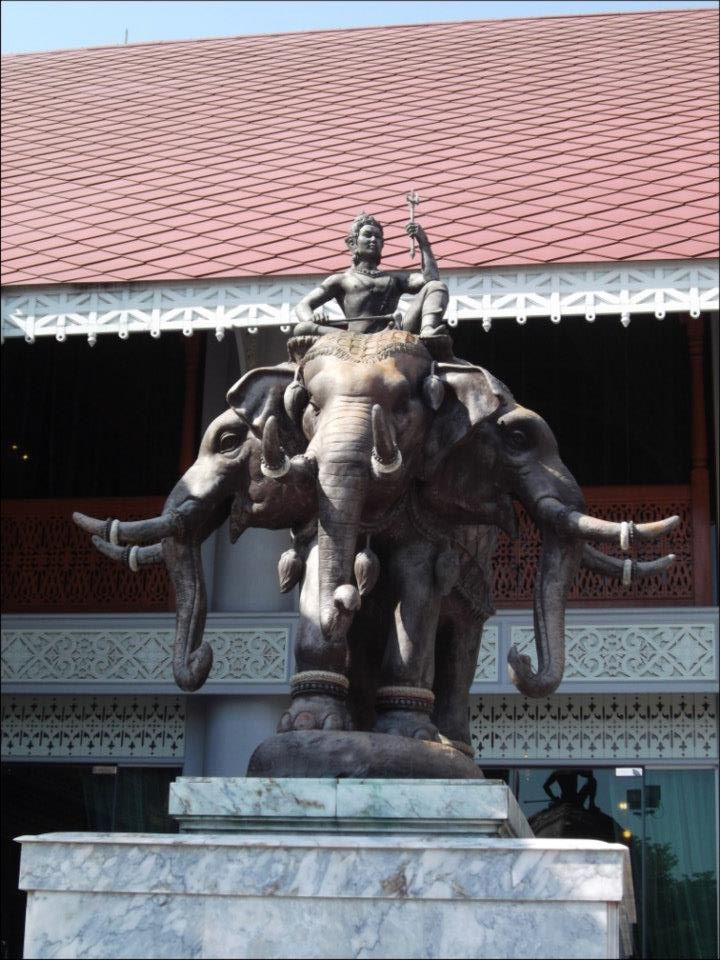 วัดเทวราชกุญชร